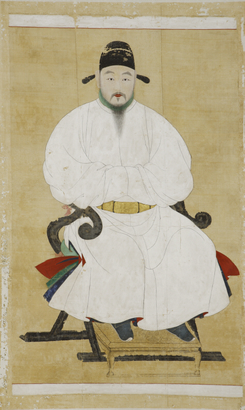 조선의 개국공신 이천우 영정 (1400년작 이모본)